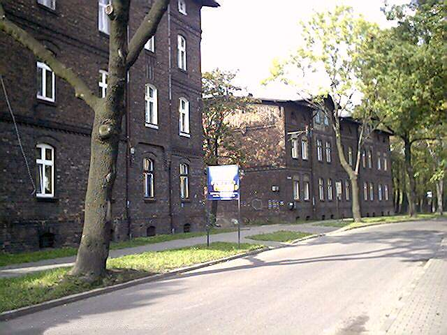 Katowice - Kolonia Pniaki. "Familoki" wzdłuż ul.Siemianowickiej (2003r). Autor: Medvi